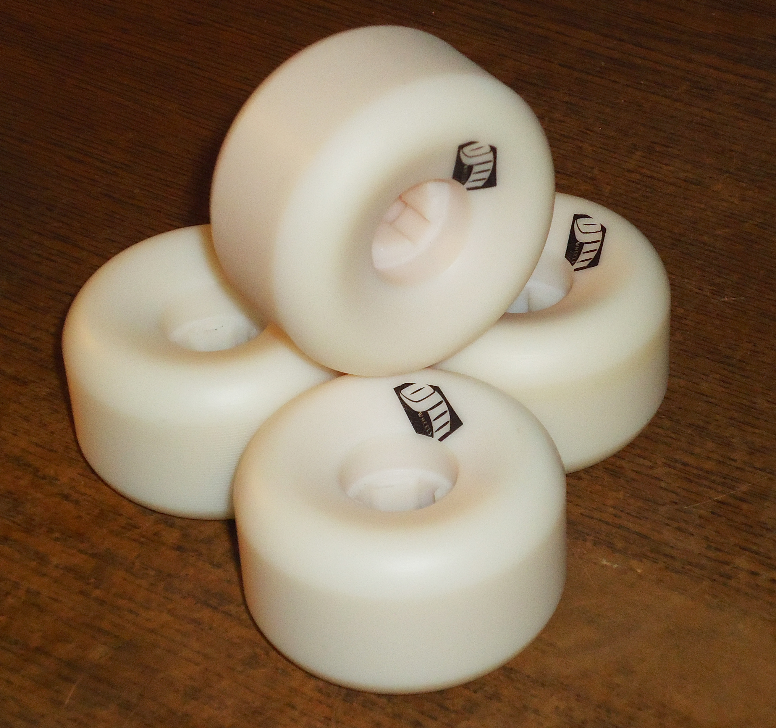 Колёса для стритборда